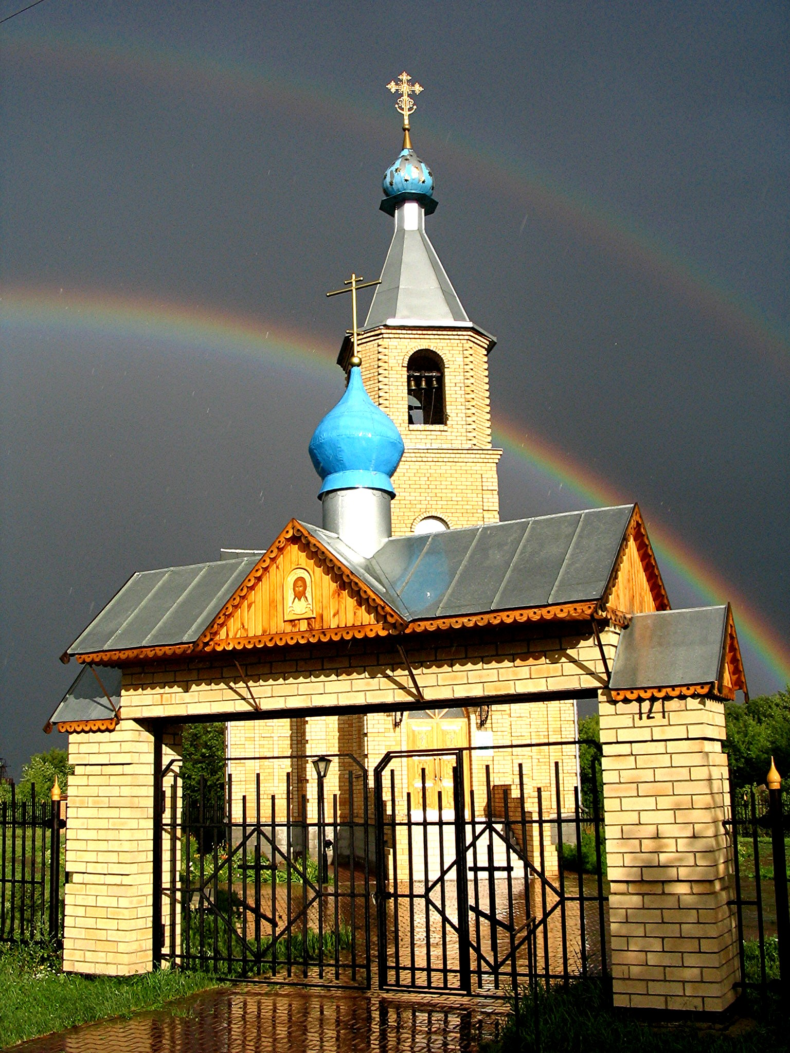 Свято-Успенская Церковь июль 2006 год